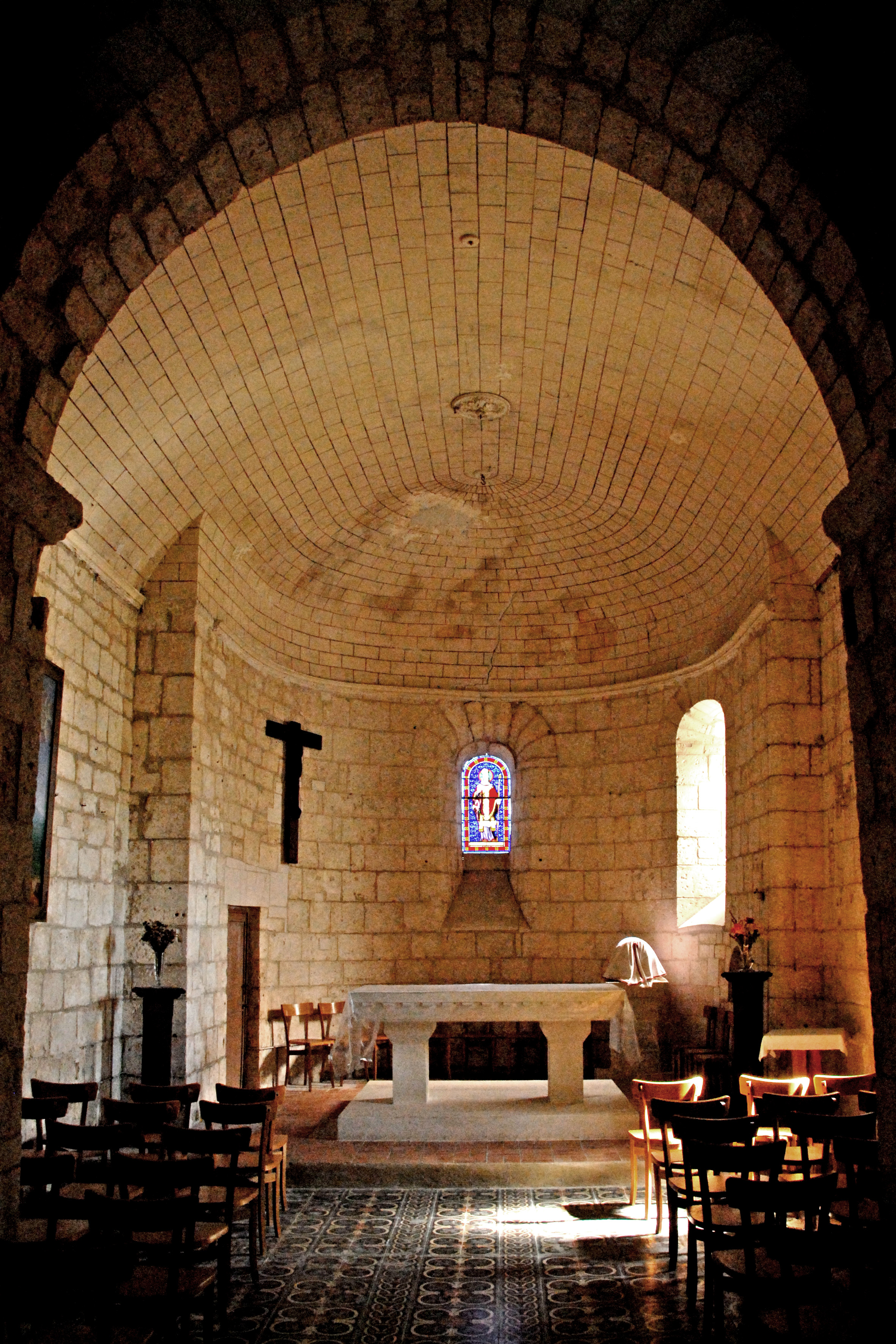 Saint-Bris-de-Bois, Chorraum vom Turm aus